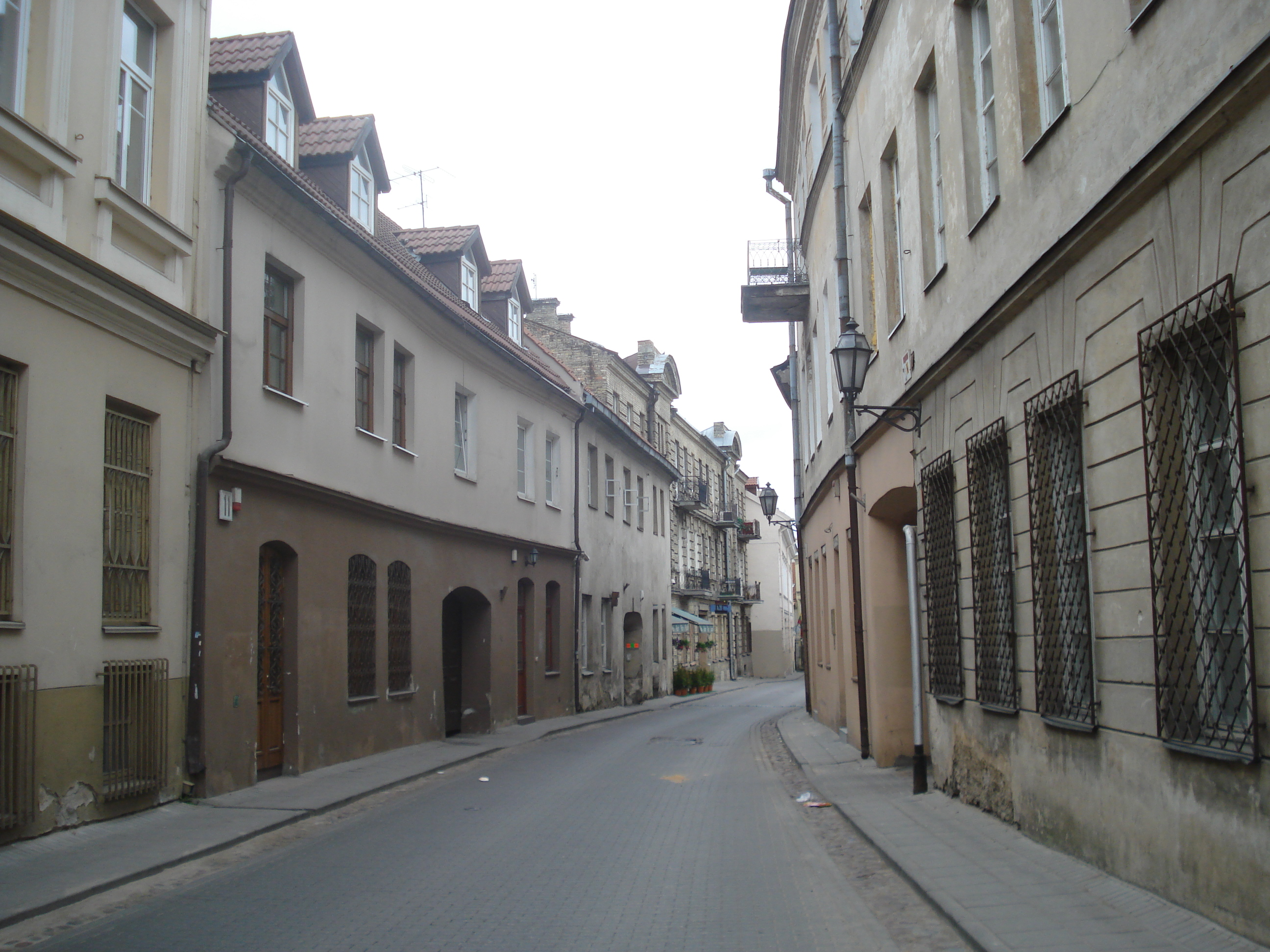 Bokšto gatvė (Bokshto street) in Vilnius